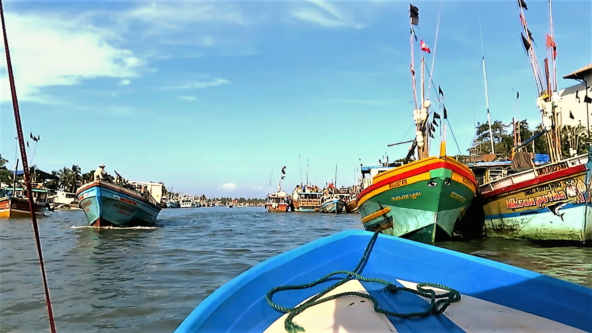 Bootsfahrt durch die Lagune bei Negombo.